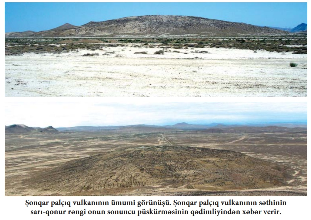 Şonqar palçıq vulkanı